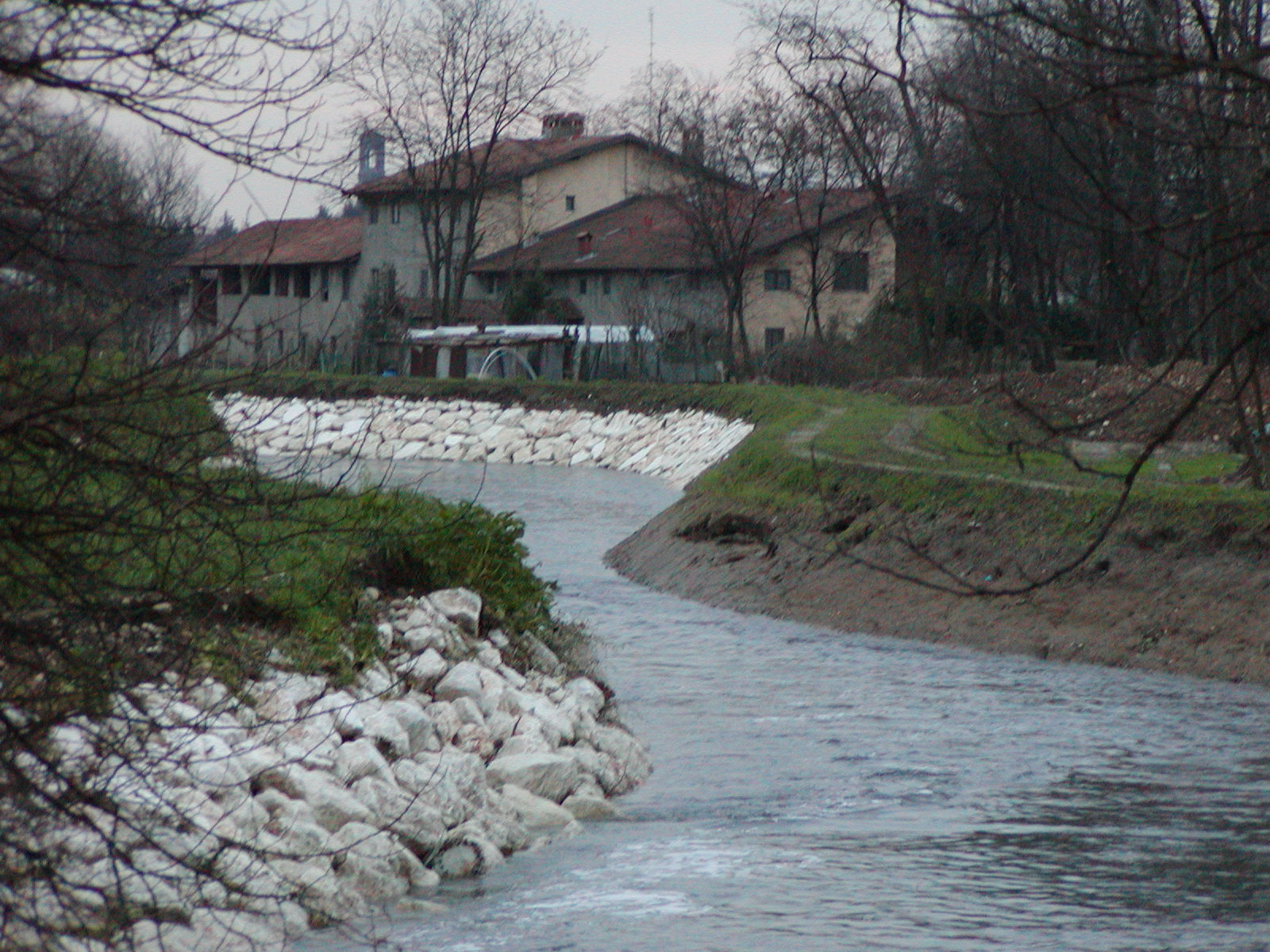 Parabiago. Fiume Olona. Presso mulino Rancilio This is a photo of a monument which is part of cultural heritage of Italy.